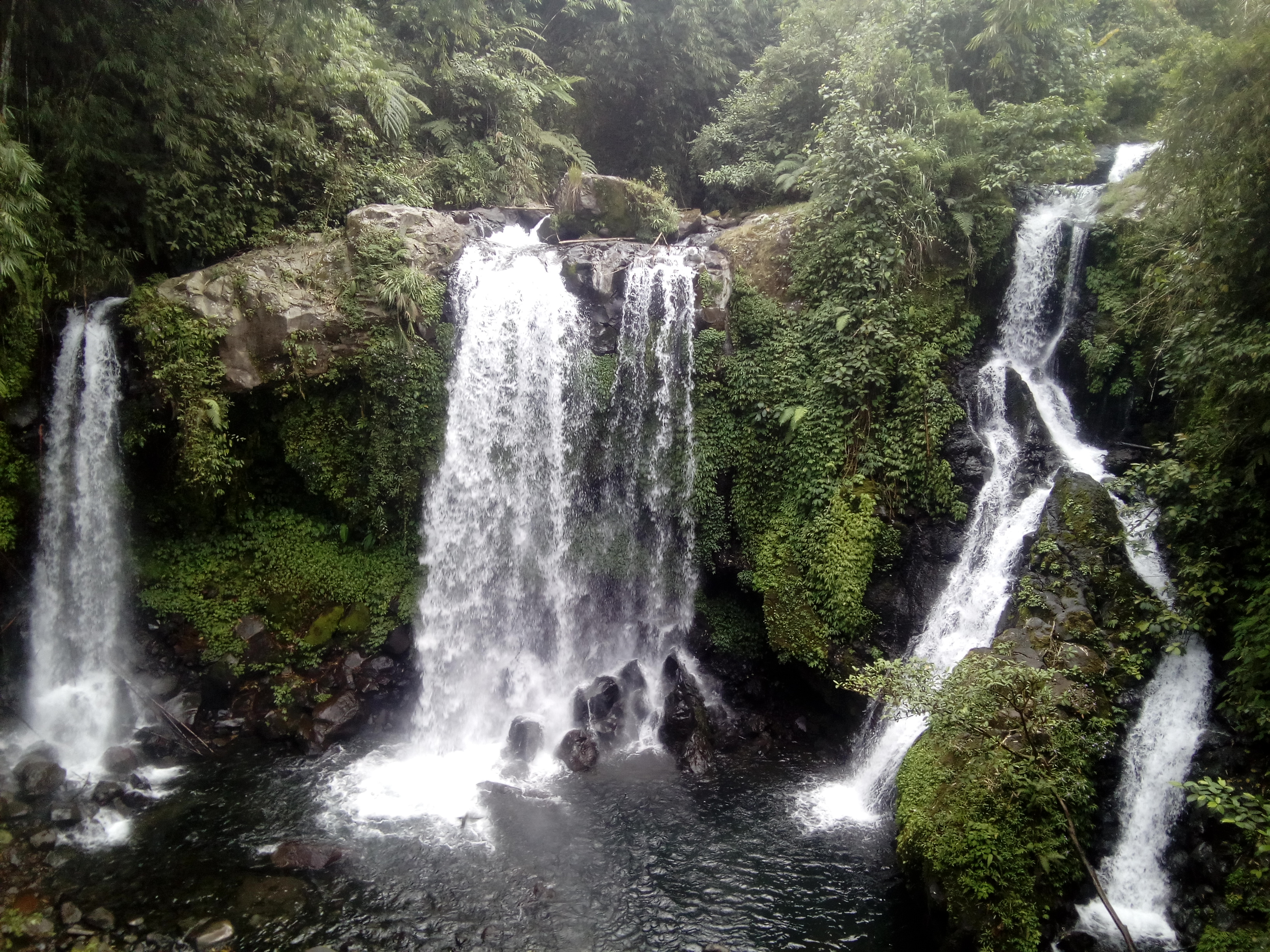 Lanskap Sungai & Gunung